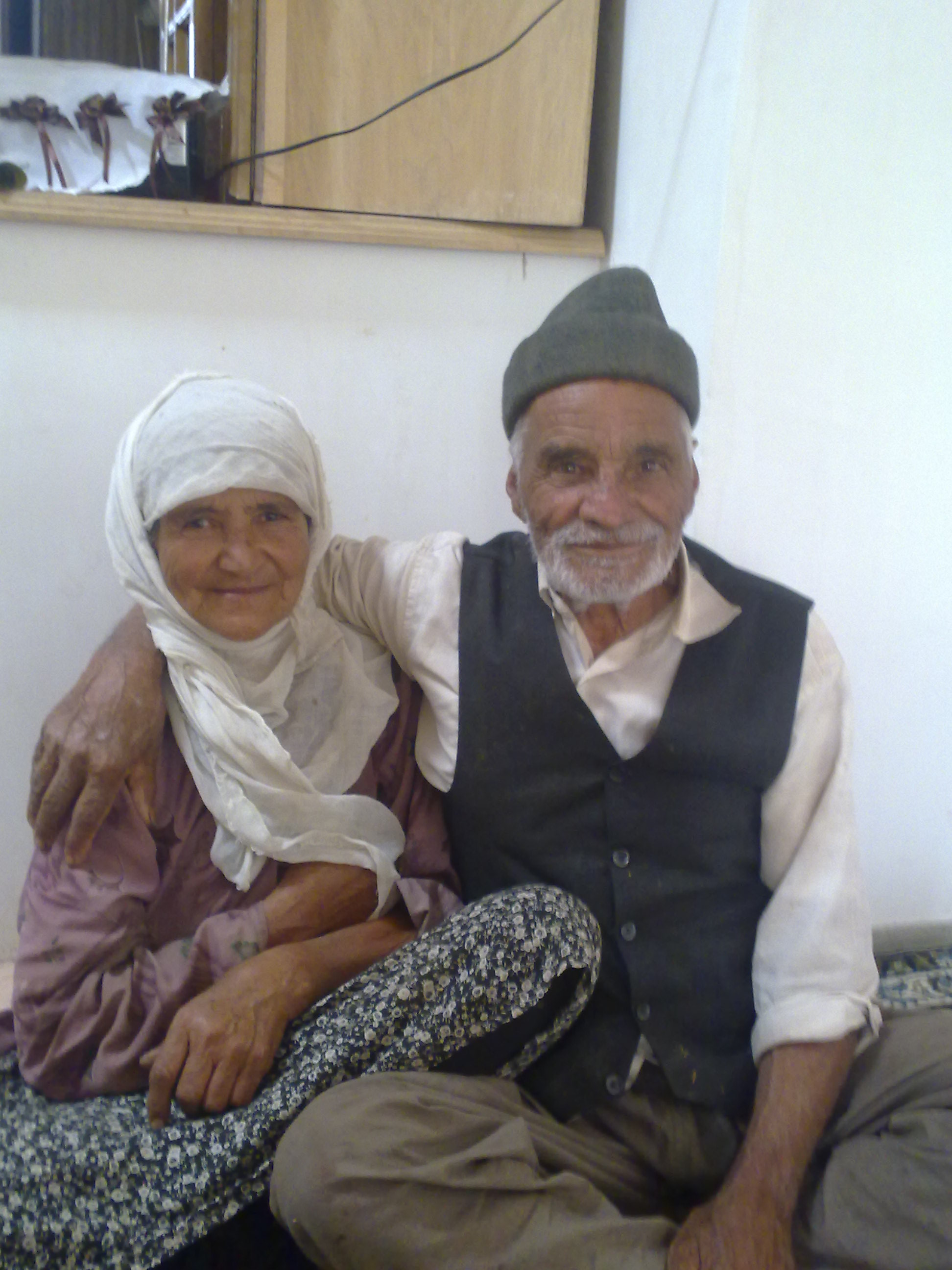 دوستی، عشق ، محبت راز ماندگاری زندگی کلاته سلطانی